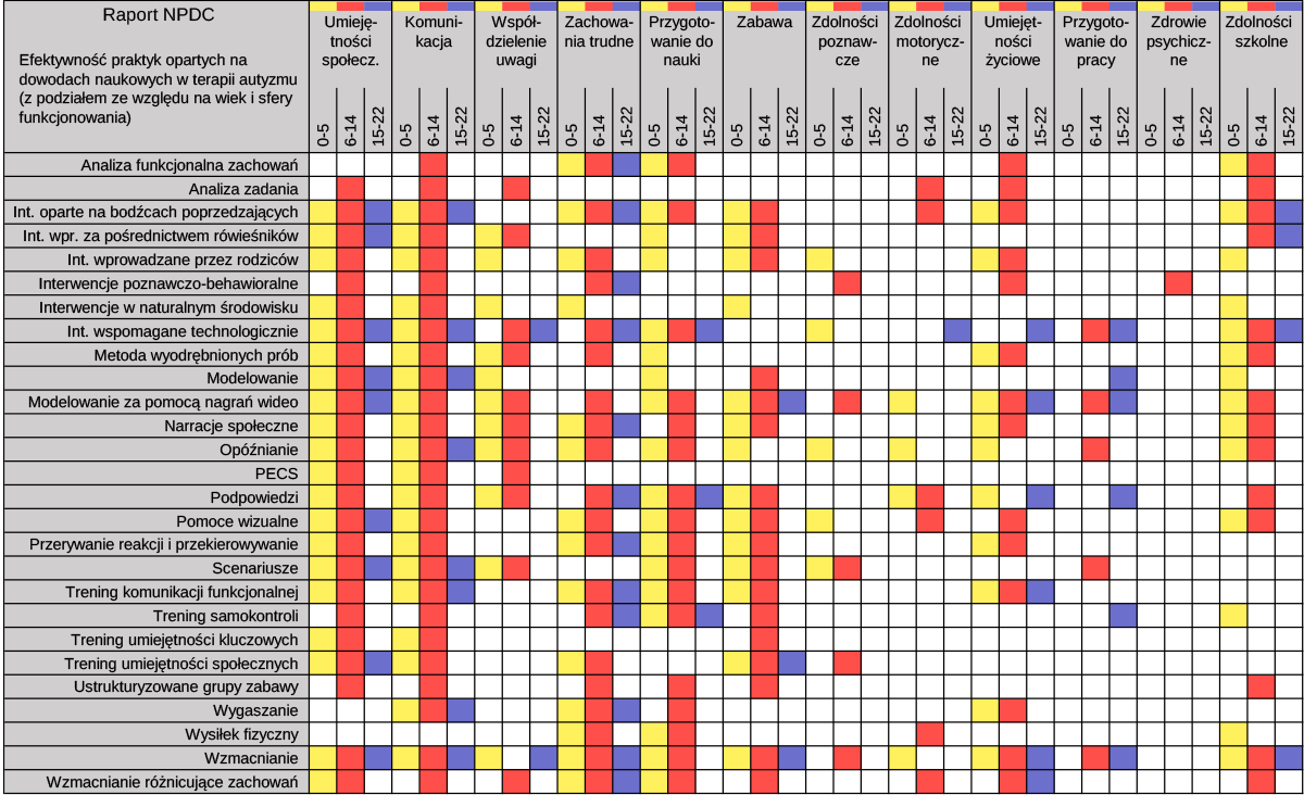 Efektywność praktyk opartych na dowodach naukowych w terapii autyzmu (z podziałem ze względu na wiek i sfery funkcjonowania): Analiza funkcjonalna zachowań – ang. functional behavior assessment Analiza zadania – ang. task-analysis Int. oparte na bodźcach poprzedzających – ang. antecedent based intervention Int. wpr. za pośrednictwem rówieśników (instrukcje i interwencje wprowadzane za pośrednictwem rówieśników) – ang. peer-mediated instruction and intervention Int. wprowadzane przez rodziców – ang. parent-implemented intervention Interwencje poznawczo-behawioralne – ang. cognitive behavioral intervention Interwencje w naturalnym środowisku – ang. naturalistic intervention Int. wspomagane technologicznie – ang. technology-aided instruction and intervention Metoda wyodrębnionych prób – ang. discreate trial teaching Modelowanie – ang. modeling Modelowanie za pomocą nagrań wideo – ang. video modeling Narracje społeczne – ang. social narratives Opóźnianie – ang. time delay PECS – ang. Picture Exchange Communication System Podpowiedzi – ang. prompting Pomoce wizualne – ang. visual suport Przerywanie reakcji i przekierowywanie – ang. response interruption and redirection Scenariusze – ang. scripting Trening komunikacji funkcjonalnej – ang. functional communication training Trening samokontroli – ang. self-management Trening umiejętności kluczowych – ang. pivotal response training Trening umiejętności społecznych – ang. social skills training Ustrukturyzowane grupy zabawy – ang. structured play group Wygaszanie – ang. extinction Wysiłek fizyczny – ang. exercise Wzmacnianie – ang. reinforcement Wzmacnianie różnicujące zachowań (alternatywnych, niekompatybilnych i innych) – ang. differential reinforcement of alternative, incompatible or other behavior, DRA/I/O Original definitions in english